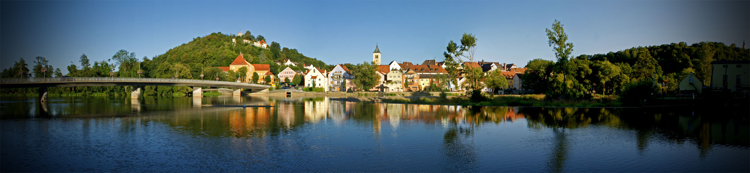 Panorama Burglengenfeld über die Naab